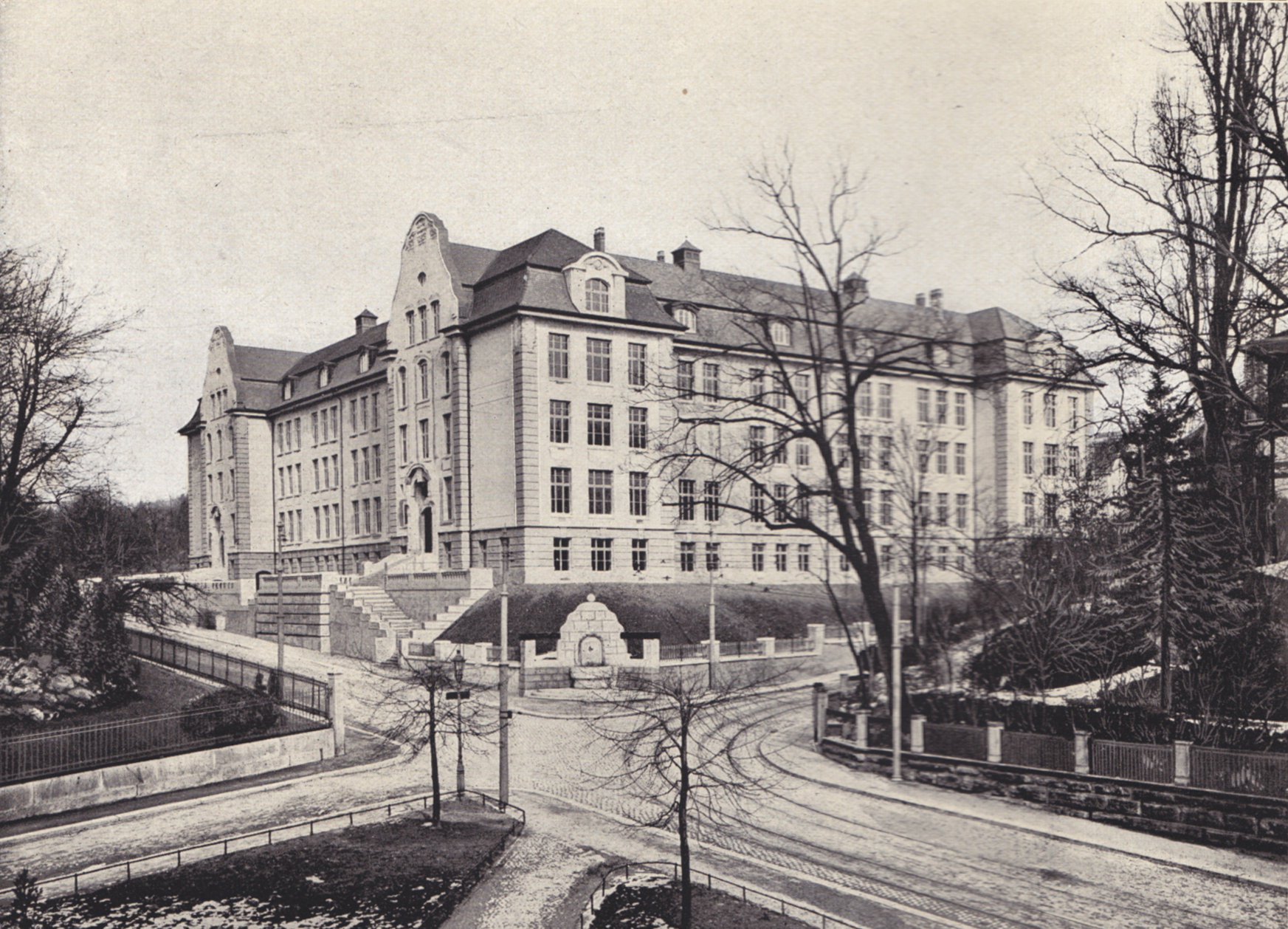 Das neue Gebäude der Kantonsschule Zürich ca. 1910, beherbergte die Industrie- und Handelsschule sowie die Räume für Physik und Chemie der ganzen Kantonsschule. Erbaut 1906-1909. Rämistrasse 74-76. Erbaut von A. Fietz.